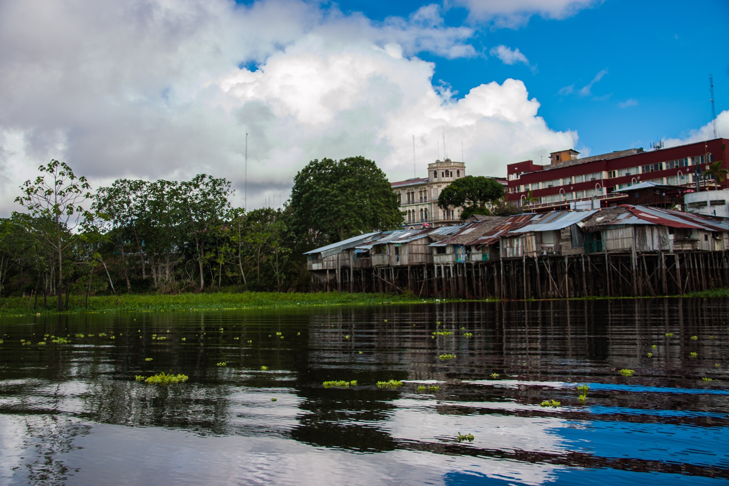 Iquitos en temporada pluvial